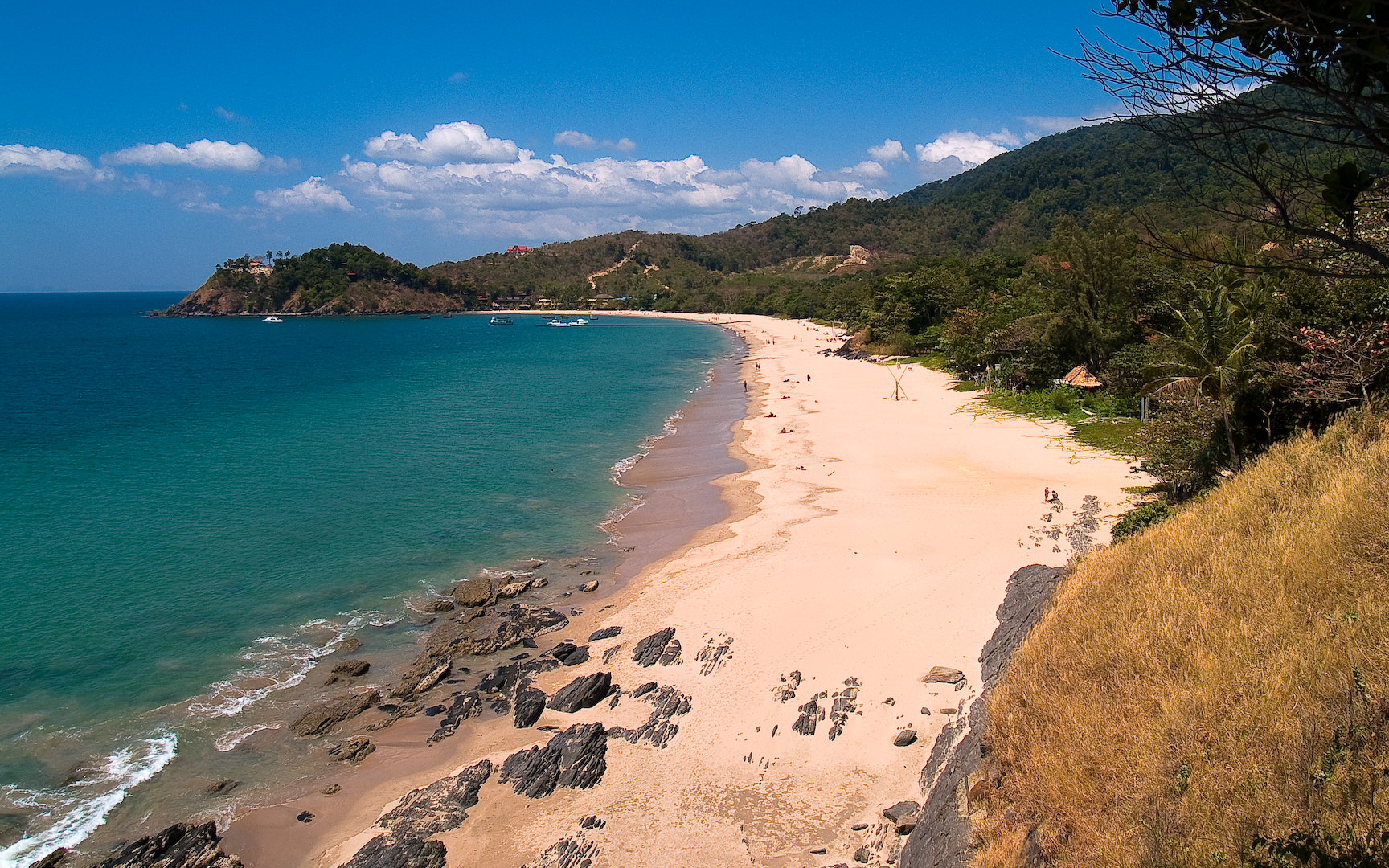 Ko Lanta Yai beach, Thailand.